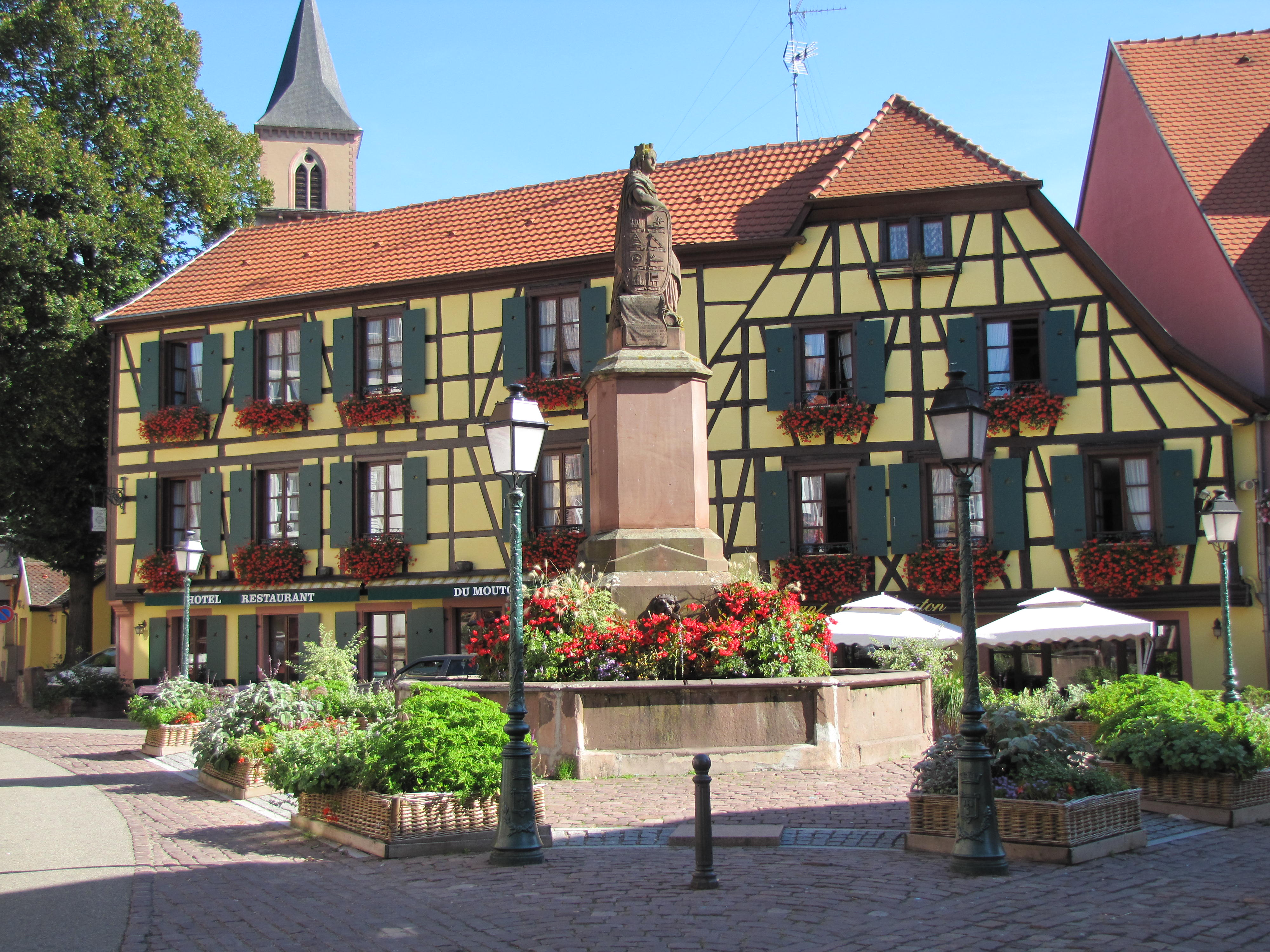 Alsace, Haut-Rhin, Ribeauvillé, Fontaine "Ville de Ribeauvillé" (XIXe), place de la Sinne. . Auberge "Au Mouton" (XVIIIe), 5 place de la Sinne: .